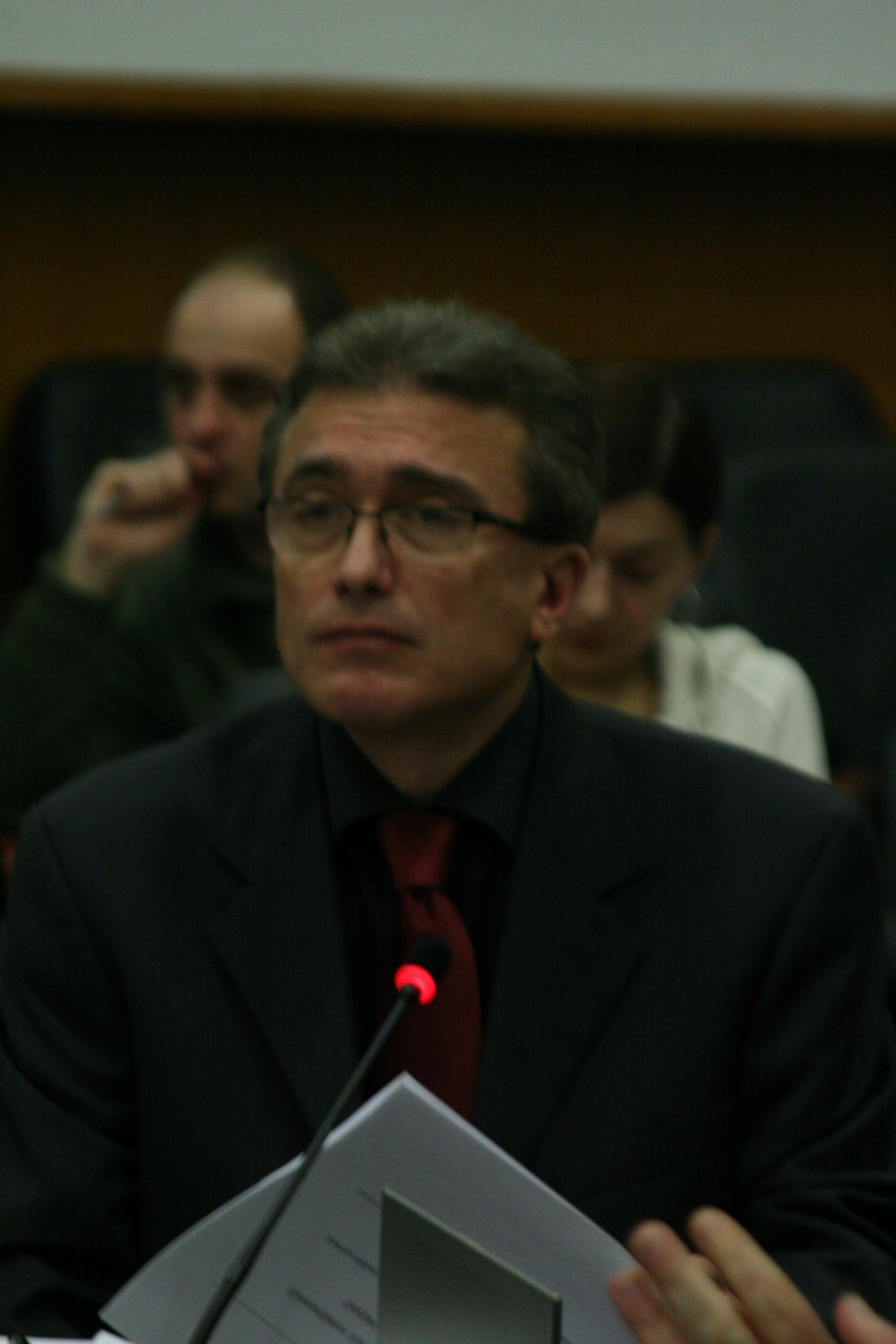 Eugen Șerbănescu, președintele Centrului Național al Cinematografiei